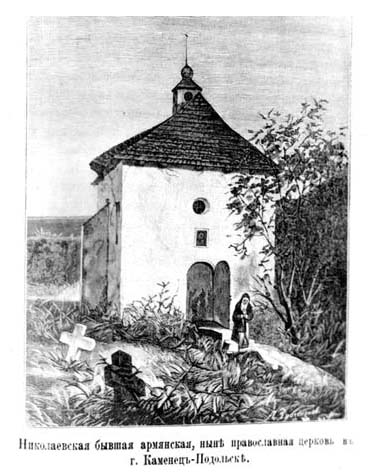 Николаевская православная церковь в Каменце-Подольском